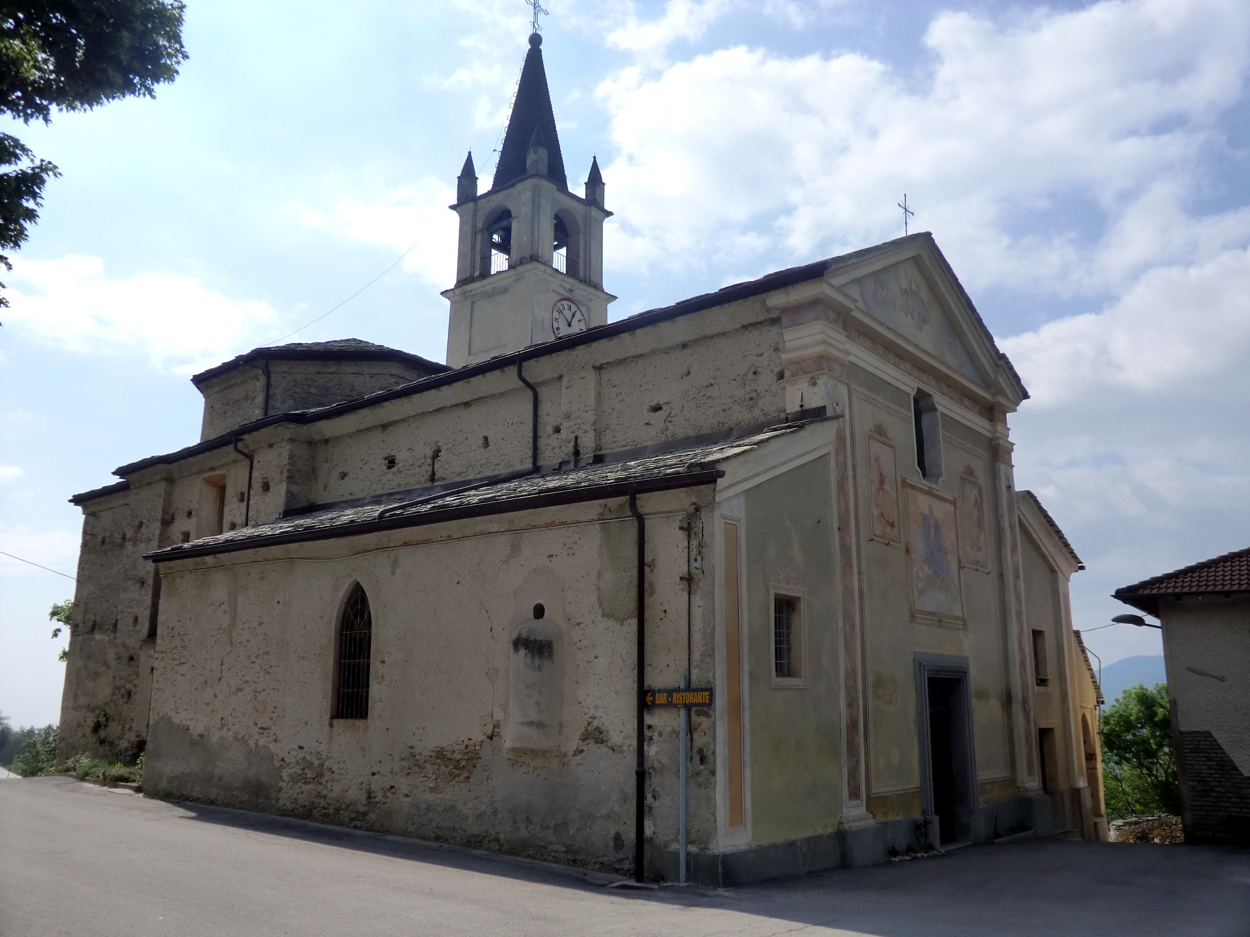 Roccabruna (Cuneo): chiesa maria vergine assunta (sec. XVII)